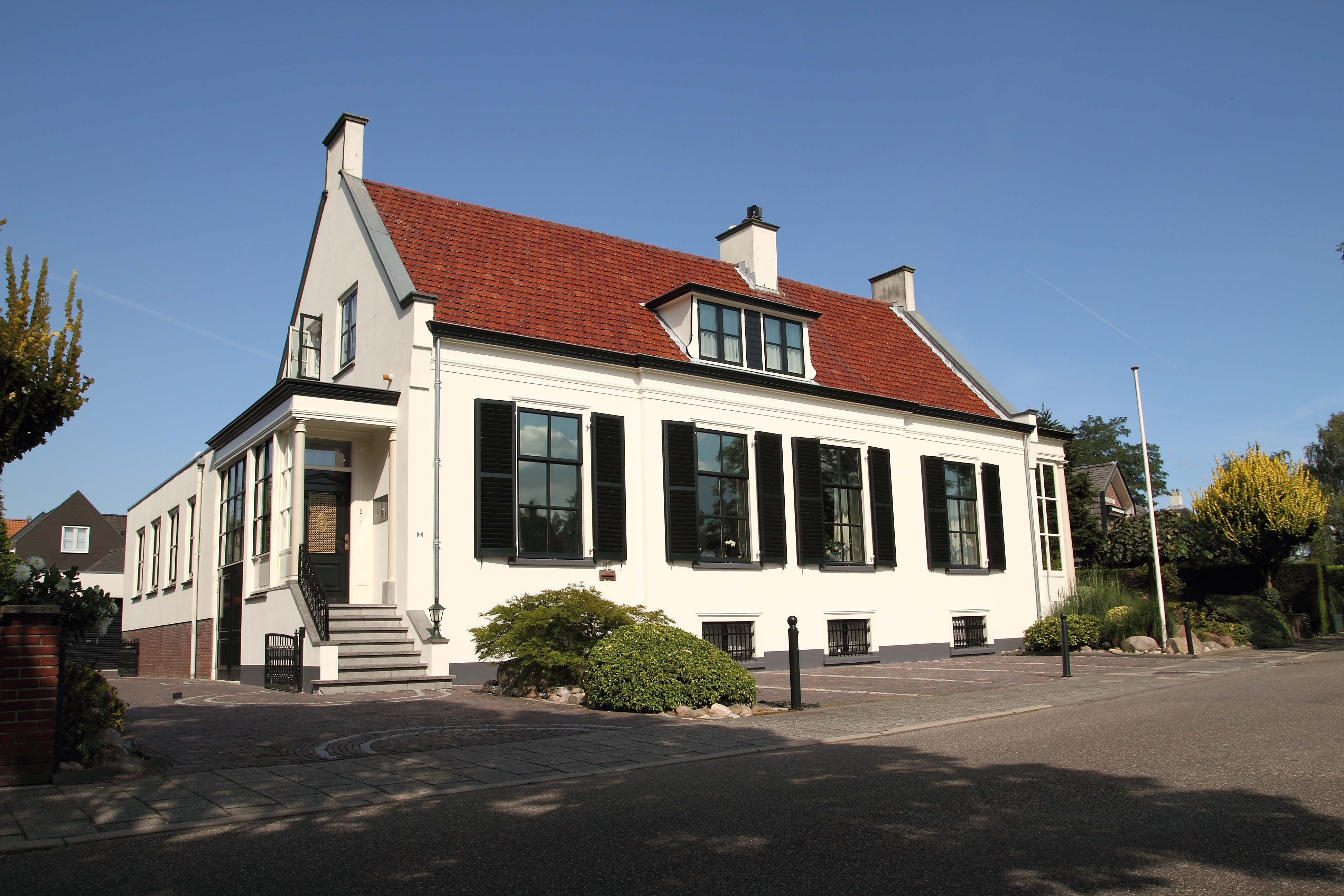 Witgepleisterd laag huis met rechte kroonlijst. In het verleden dienst gedaan als filiaal van de Raiffeisenbank. Zandweg 82 De Meern.